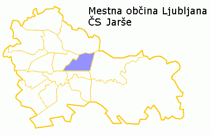 author: Navportus 18:38, 26 June 2007 (UTC) description: Jarše quarter in Ljubljana